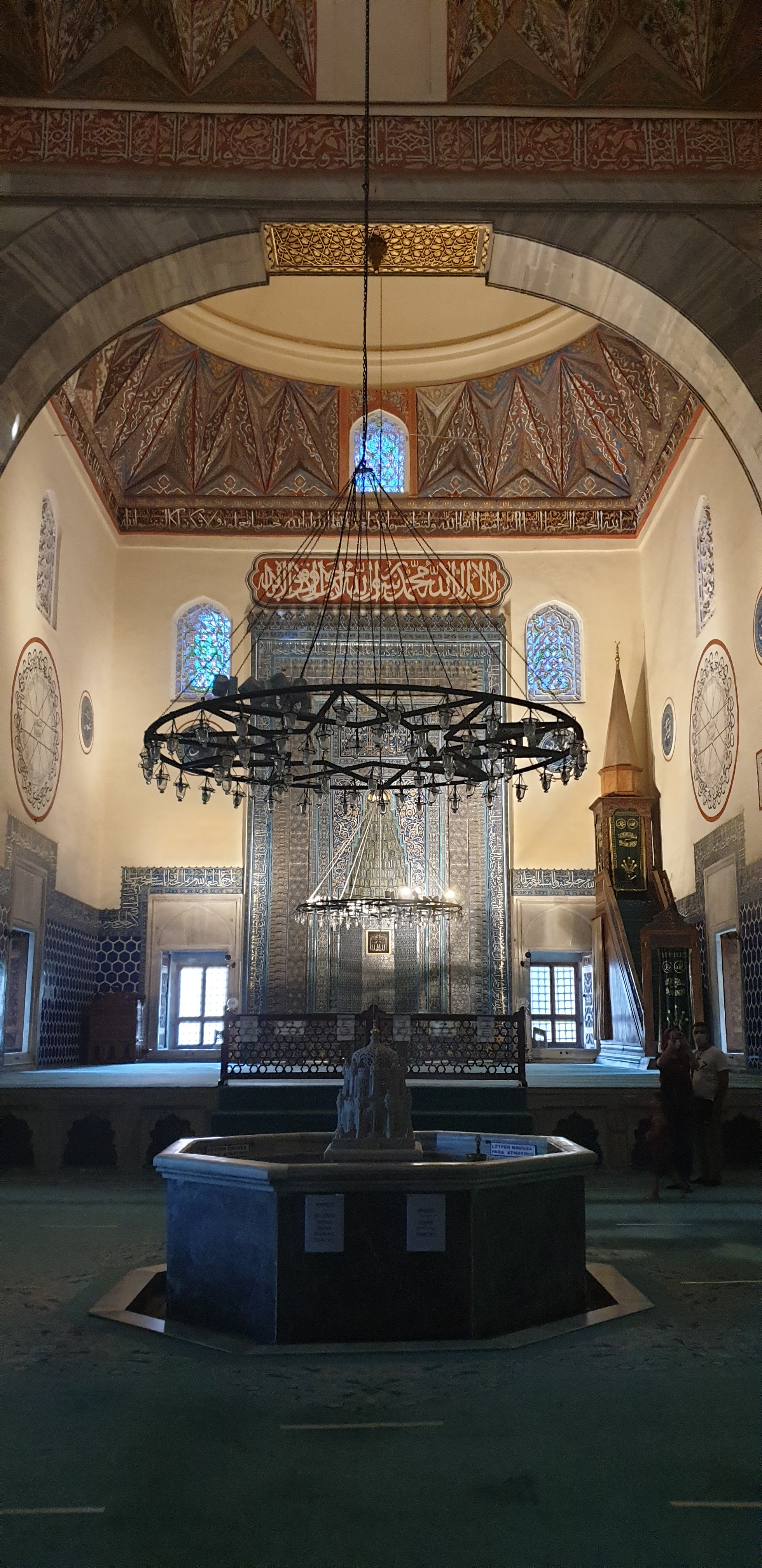 Yeşil Cami iç mekan